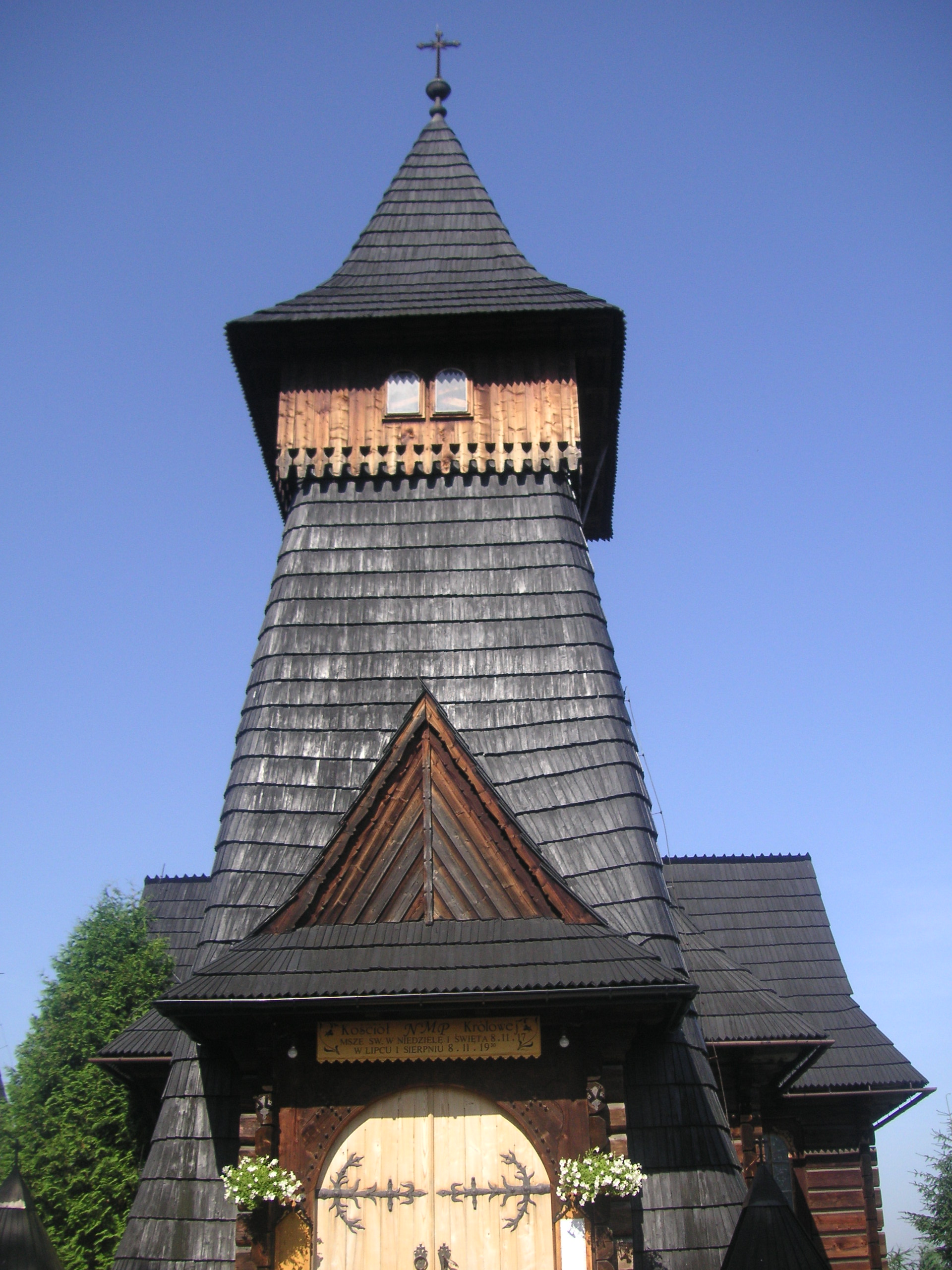 Kościół pw. Najświętszej Marii Panny Królowej Świata w Murzasichlu. Czas powstania: 1955, autor projektu: Józef Łukaszczyk.